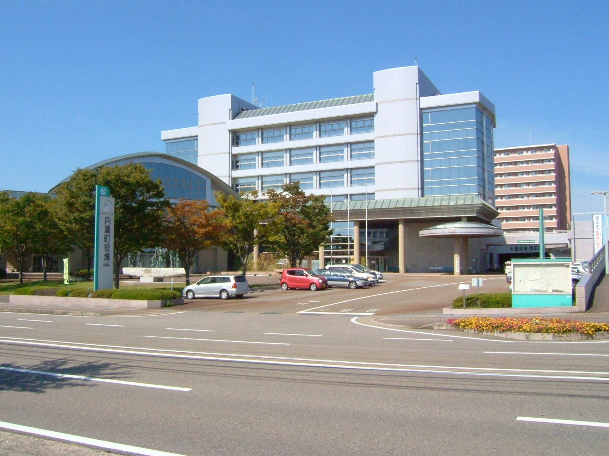 内灘町役場（石川県河北郡内灘町）